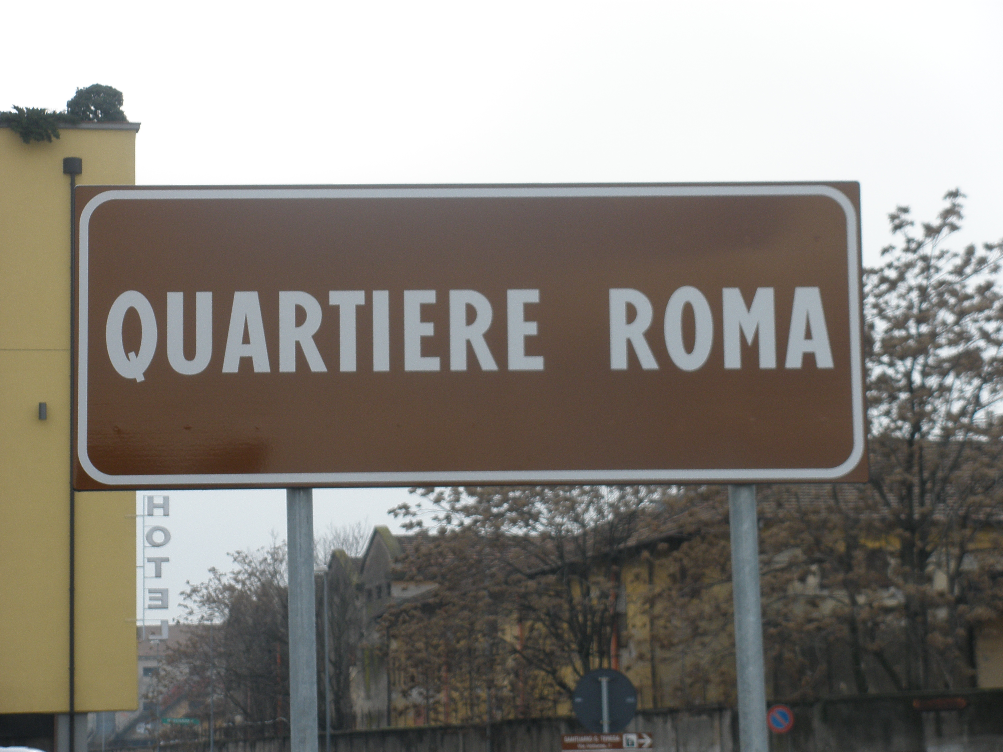 Cartello stradale "quartiere roma" a Verona. Si trova alla fine di Viale Piave, al bivio tra via Tombetta e via Santa Teresa che segnano l'entrata al quartiere.